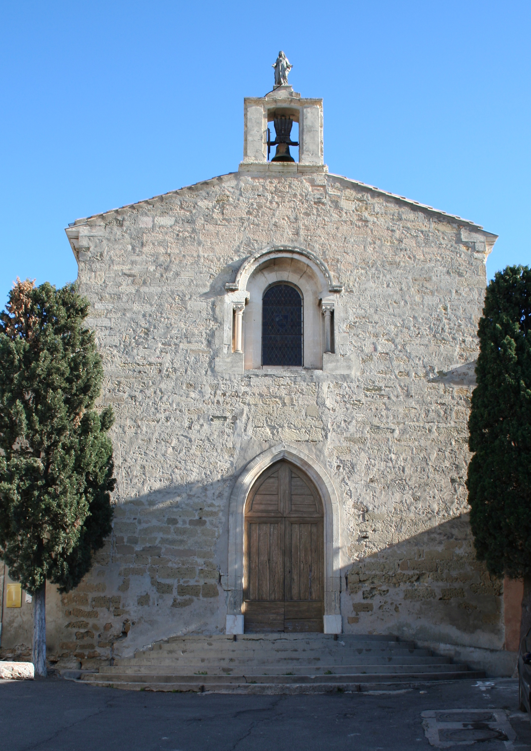 Mèze (Hérault) - chapelle des Pénitents.